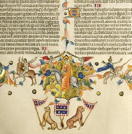 Miniature from Anjou bible